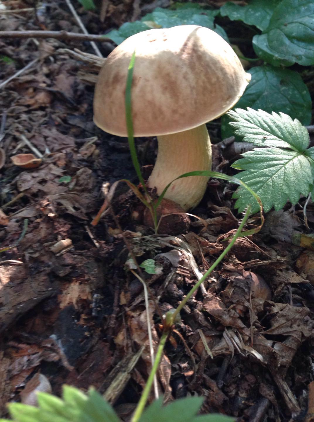 Fungo, Appennino Romagnolo, 700 m.s.l., Bosco di Noccioli, Biancospini, Sanguinelle.